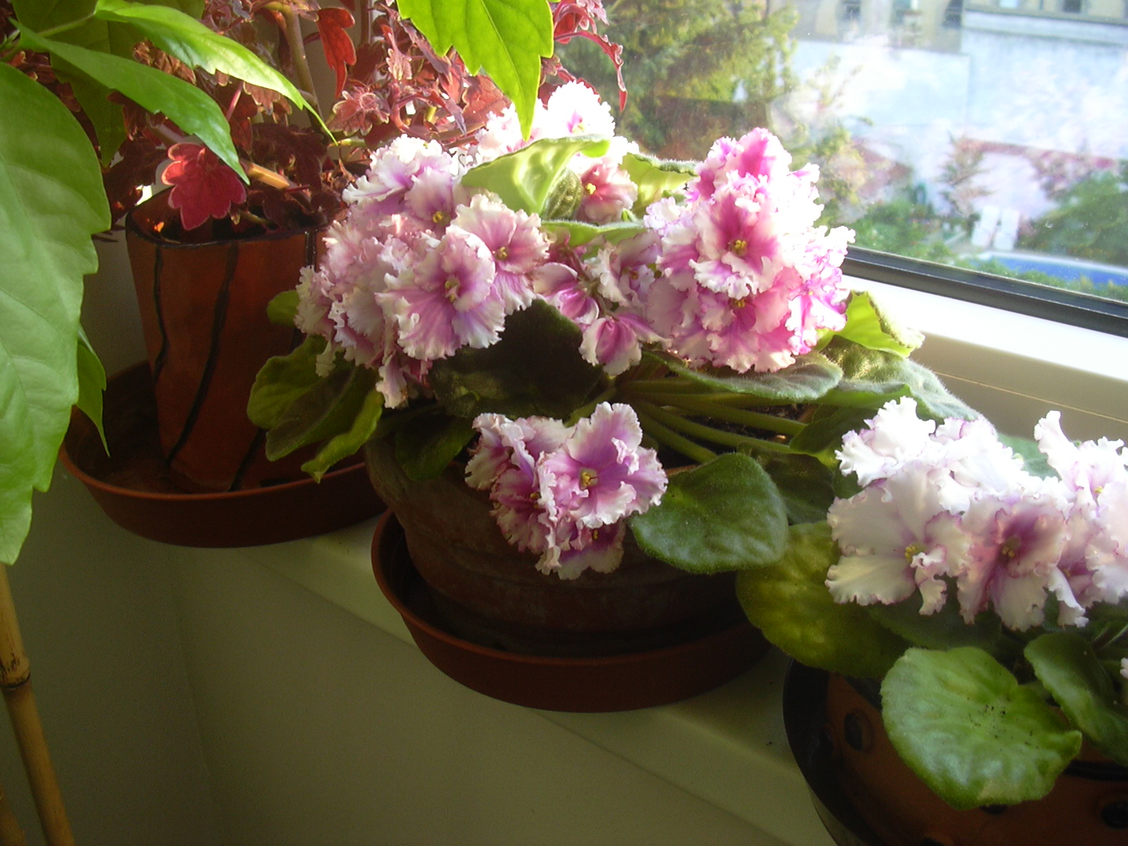 Africká fialka (botanický název - Saintpaulia)